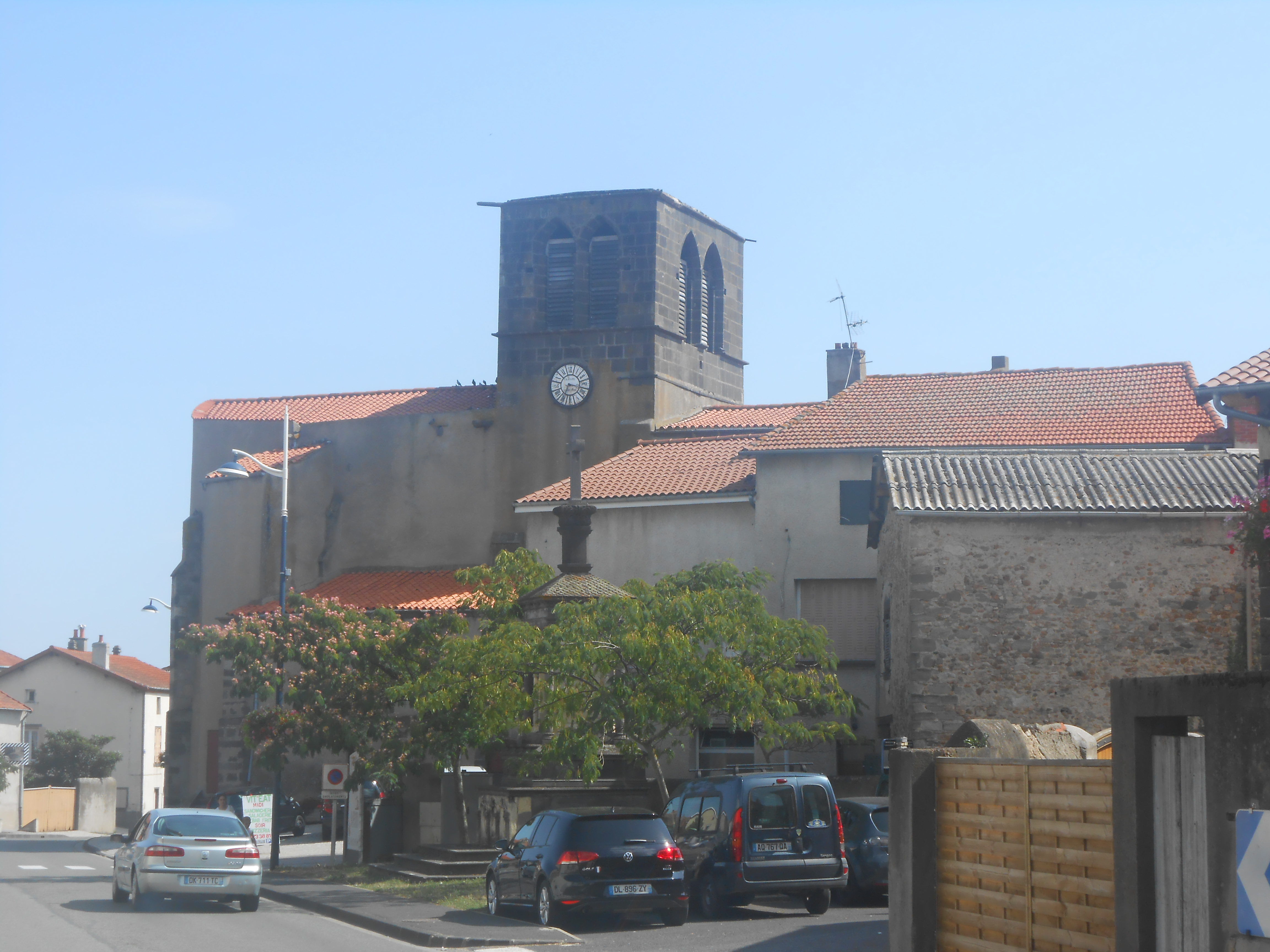 Portion du bourg de Saint-Bonnet près Riom et église Saint-Bonnet.